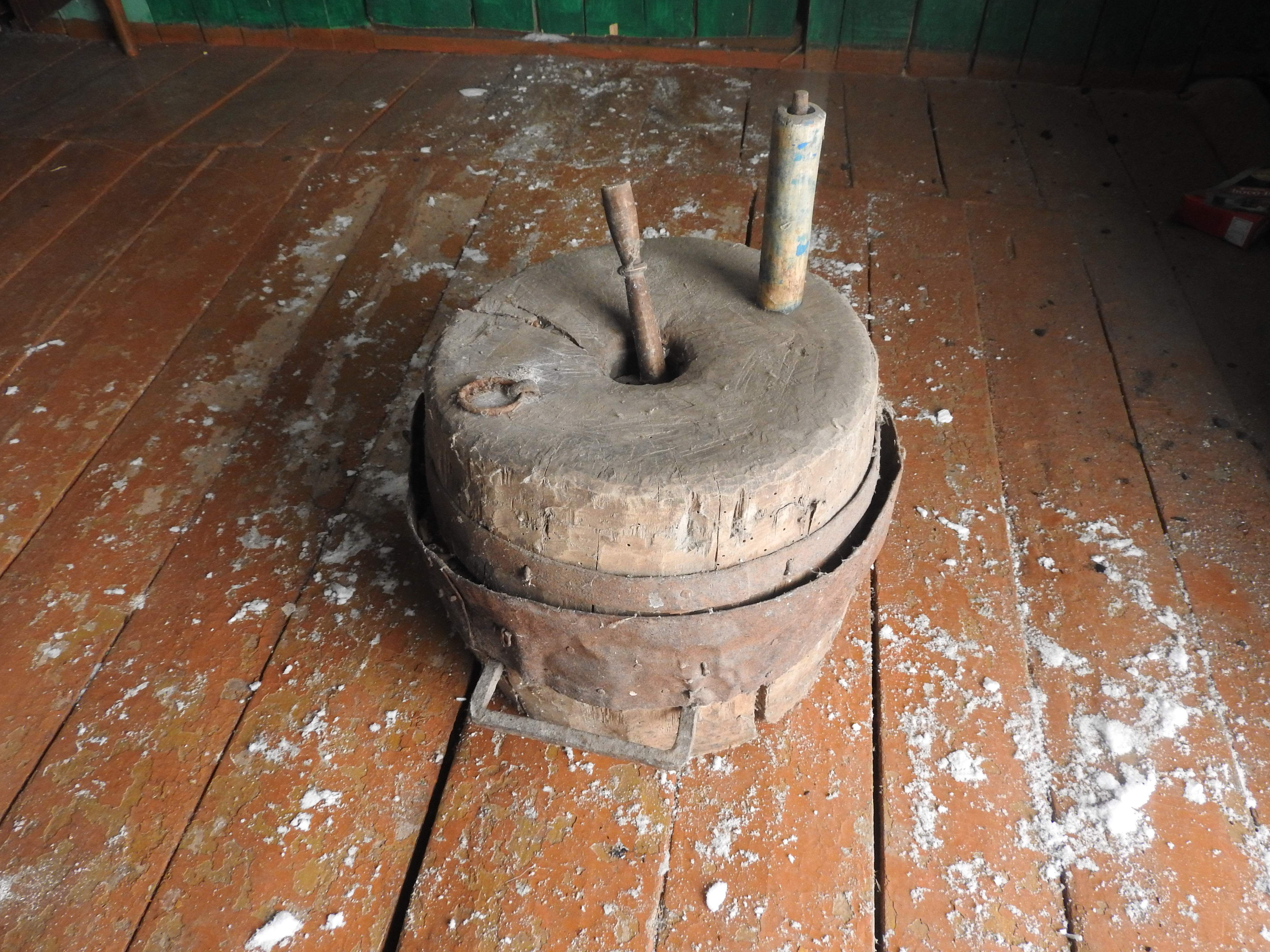 Башҡортса: Ағас тирмән